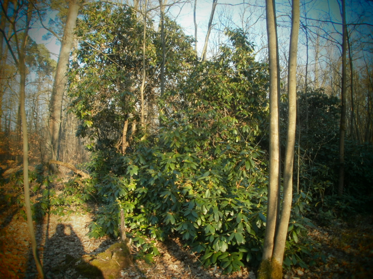 park pałacowy Pokój, Pokój 01.1985.